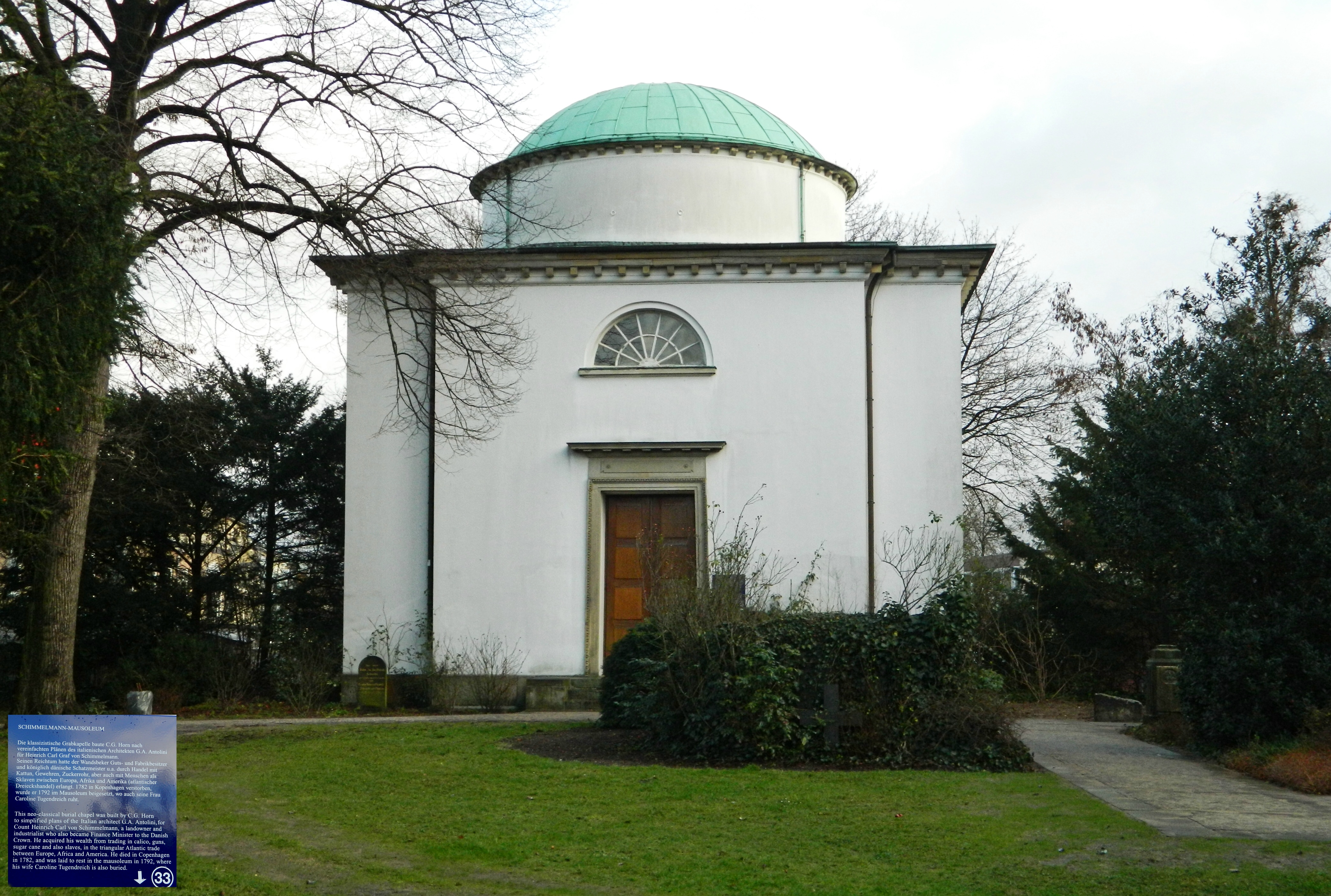 Grabkapelle